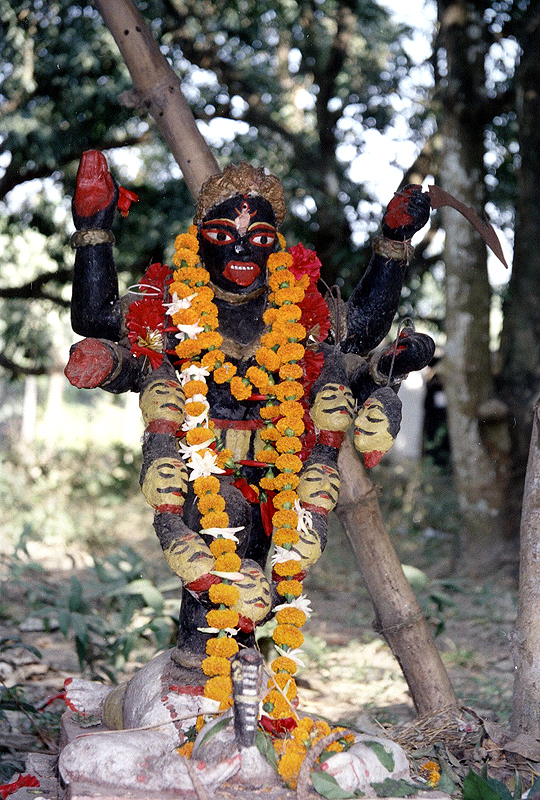 Kali-Heiligtum in einem Dorf